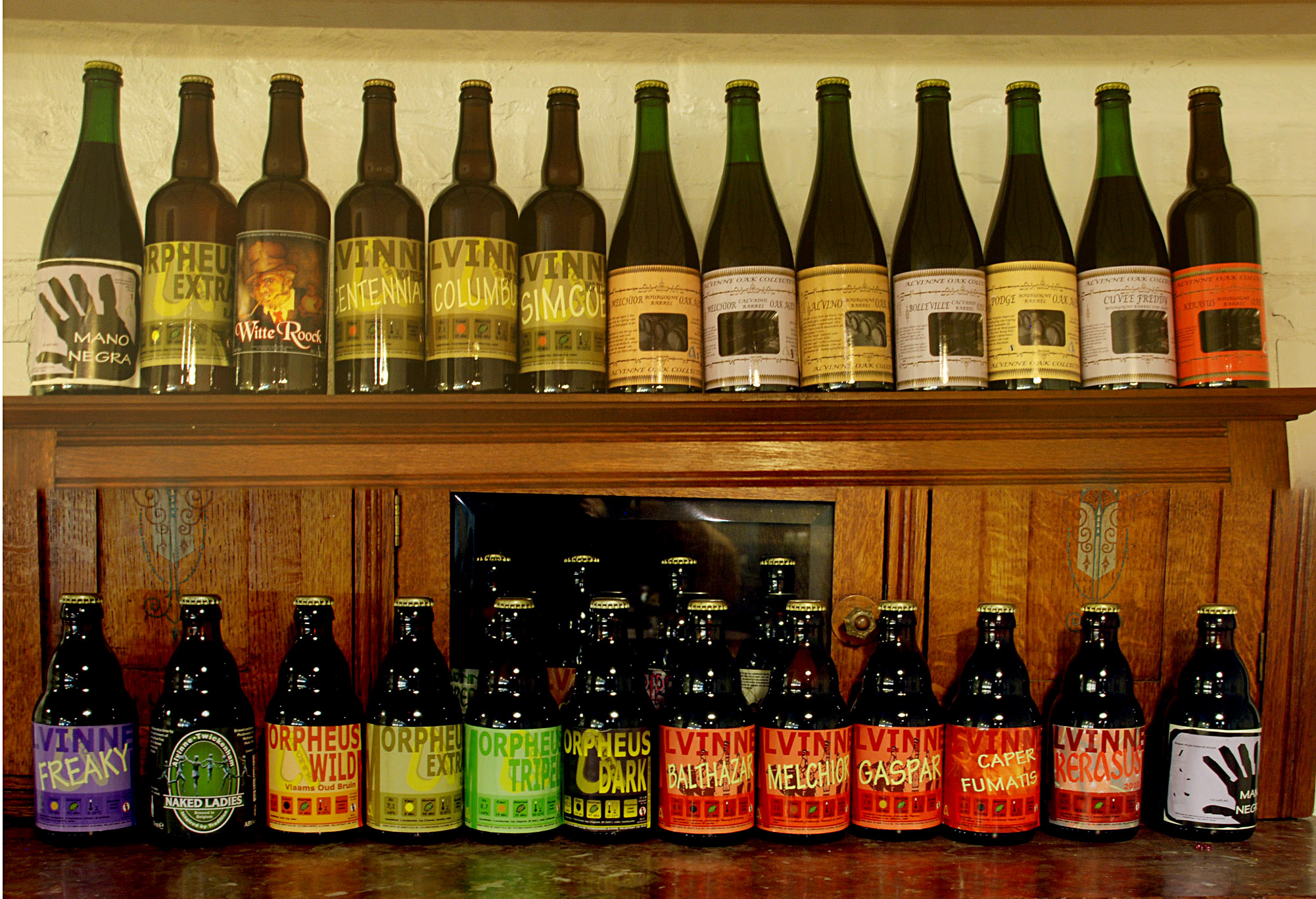 Gamma bieren brouwerij Alvinne anno 2011